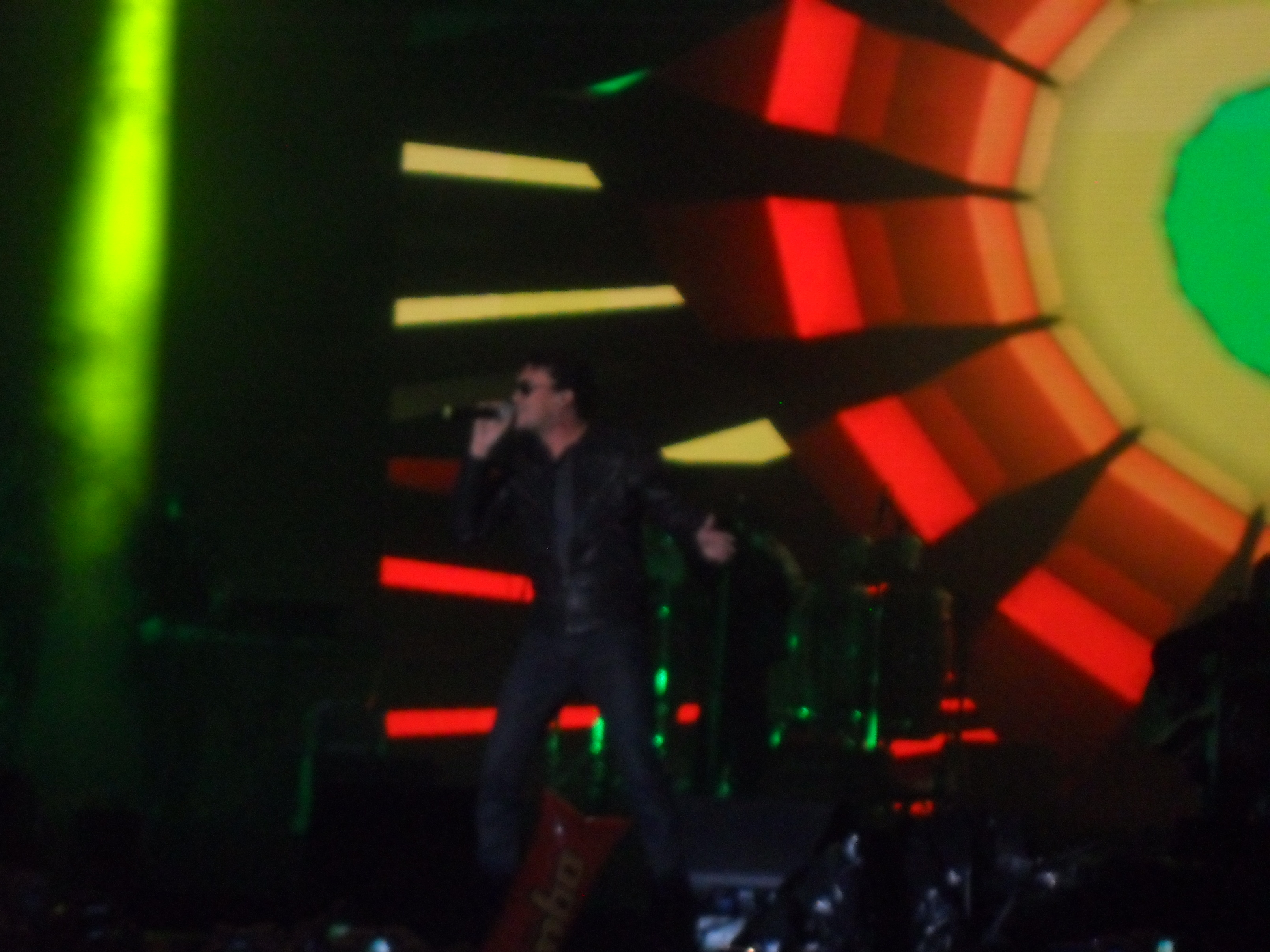 Andres Cepda en vivo.